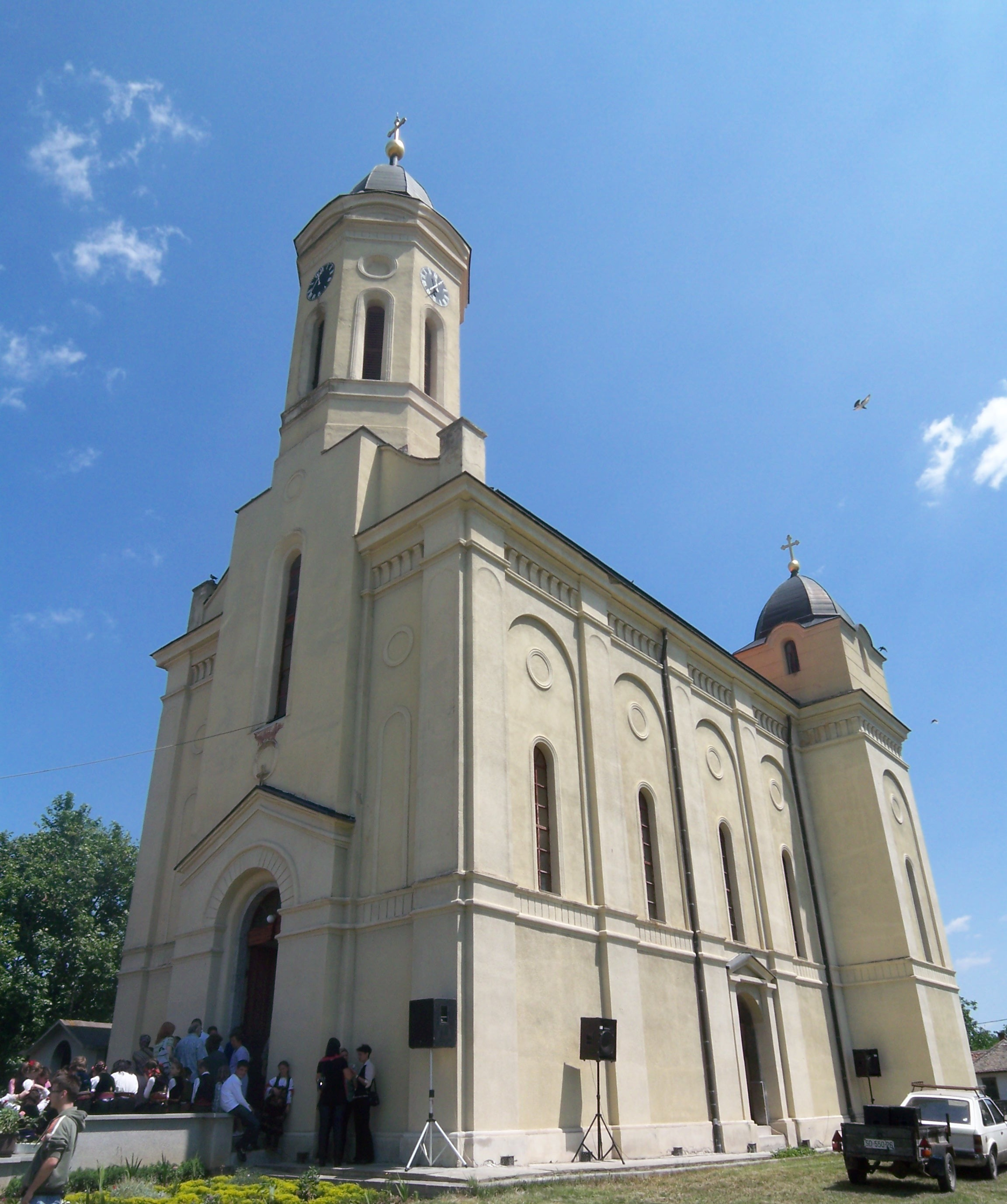 Crkva u Azanji